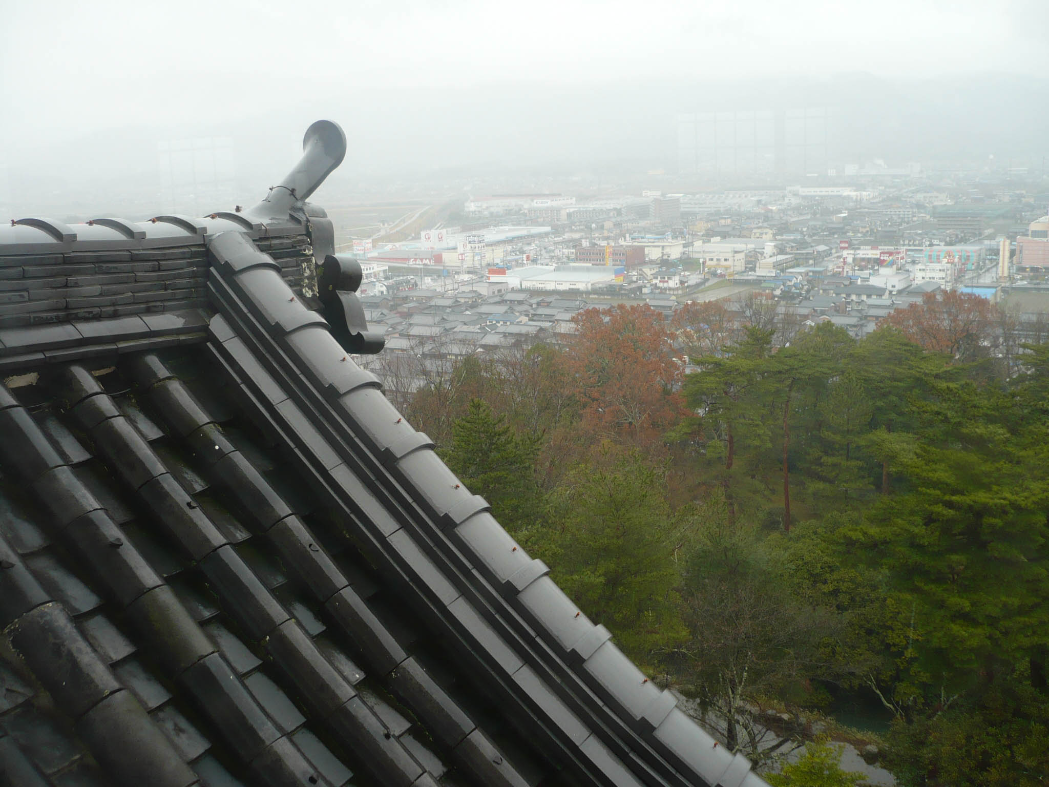 天守からの眺望